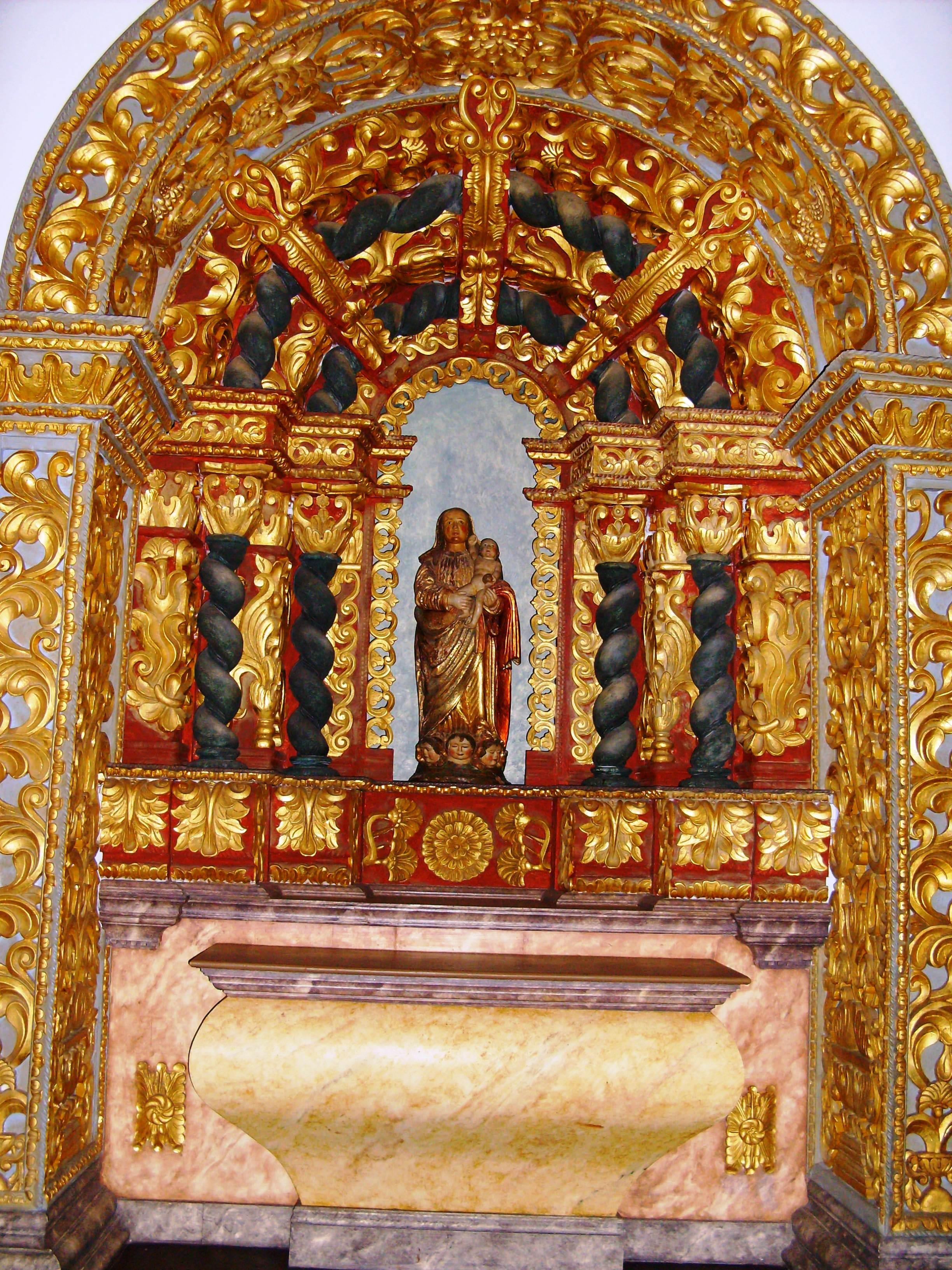 Igreja Matriz de Nossa Senhora da Assunção, Ilha de Santa Maria (Açores), Portugal.